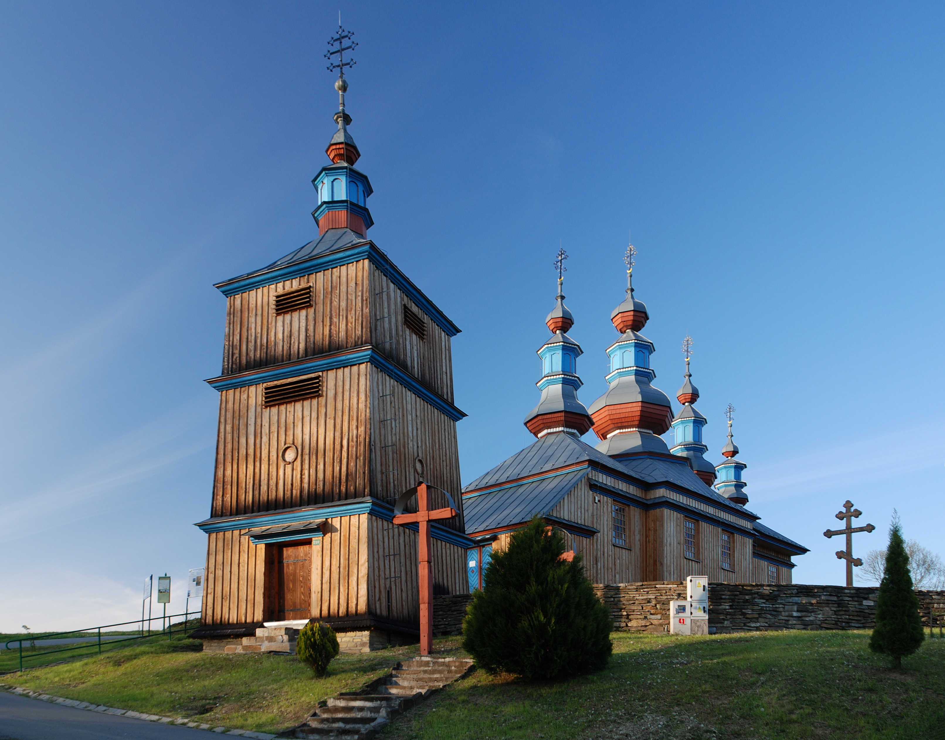 Komańcza, Cerkiew Opieki Matki Bożej, spalona w 2006 r., odbudowana w latach 2008–2010.